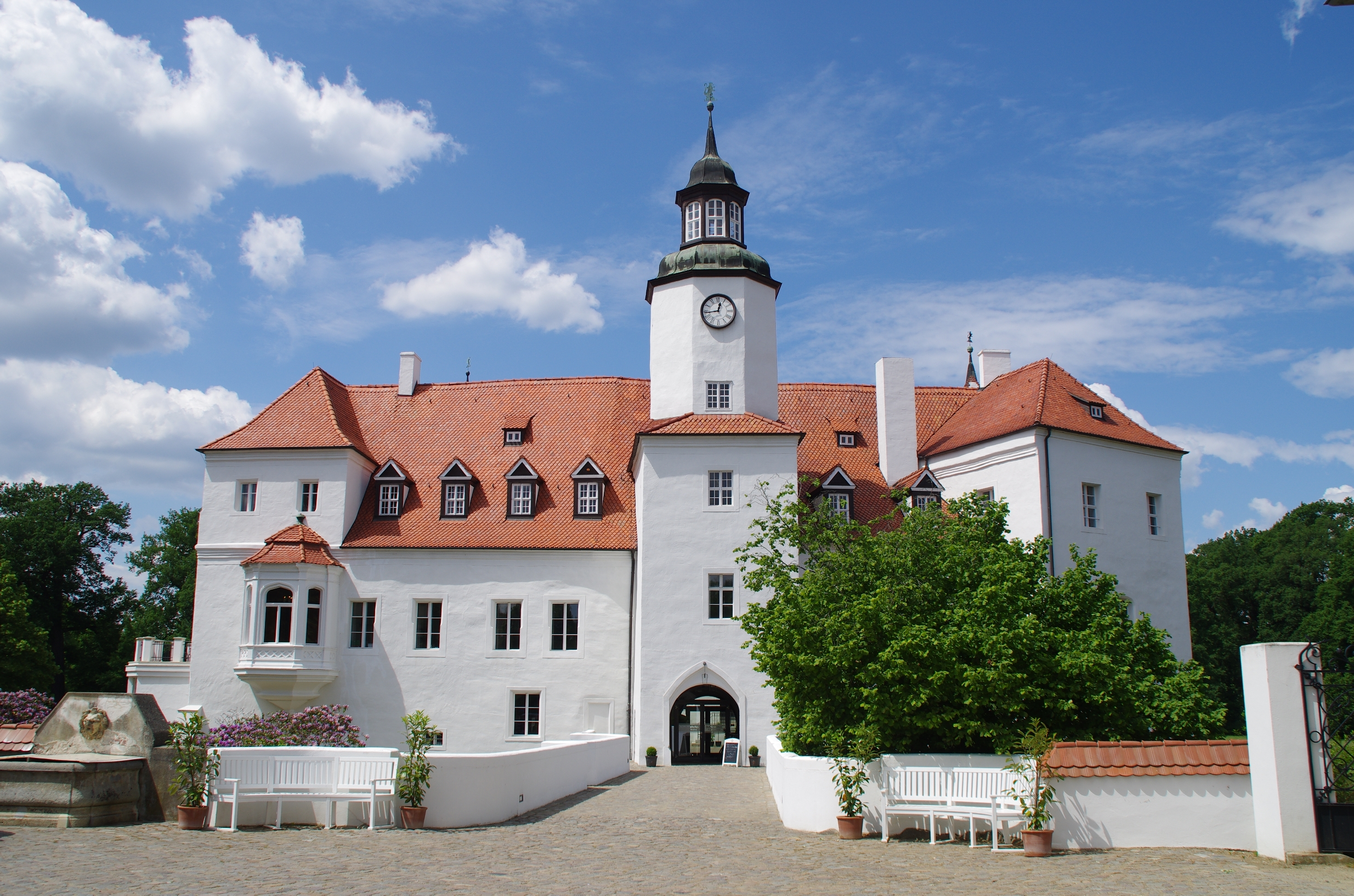 Luckau, Ortsteil Fürstlich Drehna in Brandenburg. Das Schloss steht unter Denkmalschutz. Es ist heute ein Hotel.